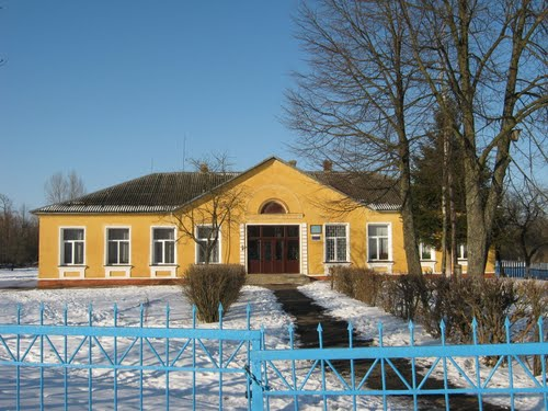 Сільська школа